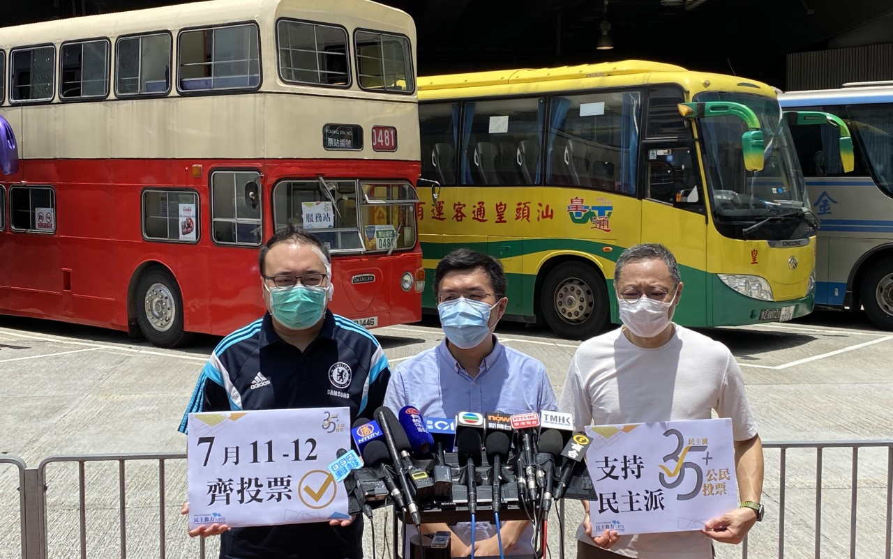 中文（香港）: 負責統籌及協調初選的戴耀廷（右至左）、區諾軒、趙家賢，7月11日中午在投票站公佈投票啟動。